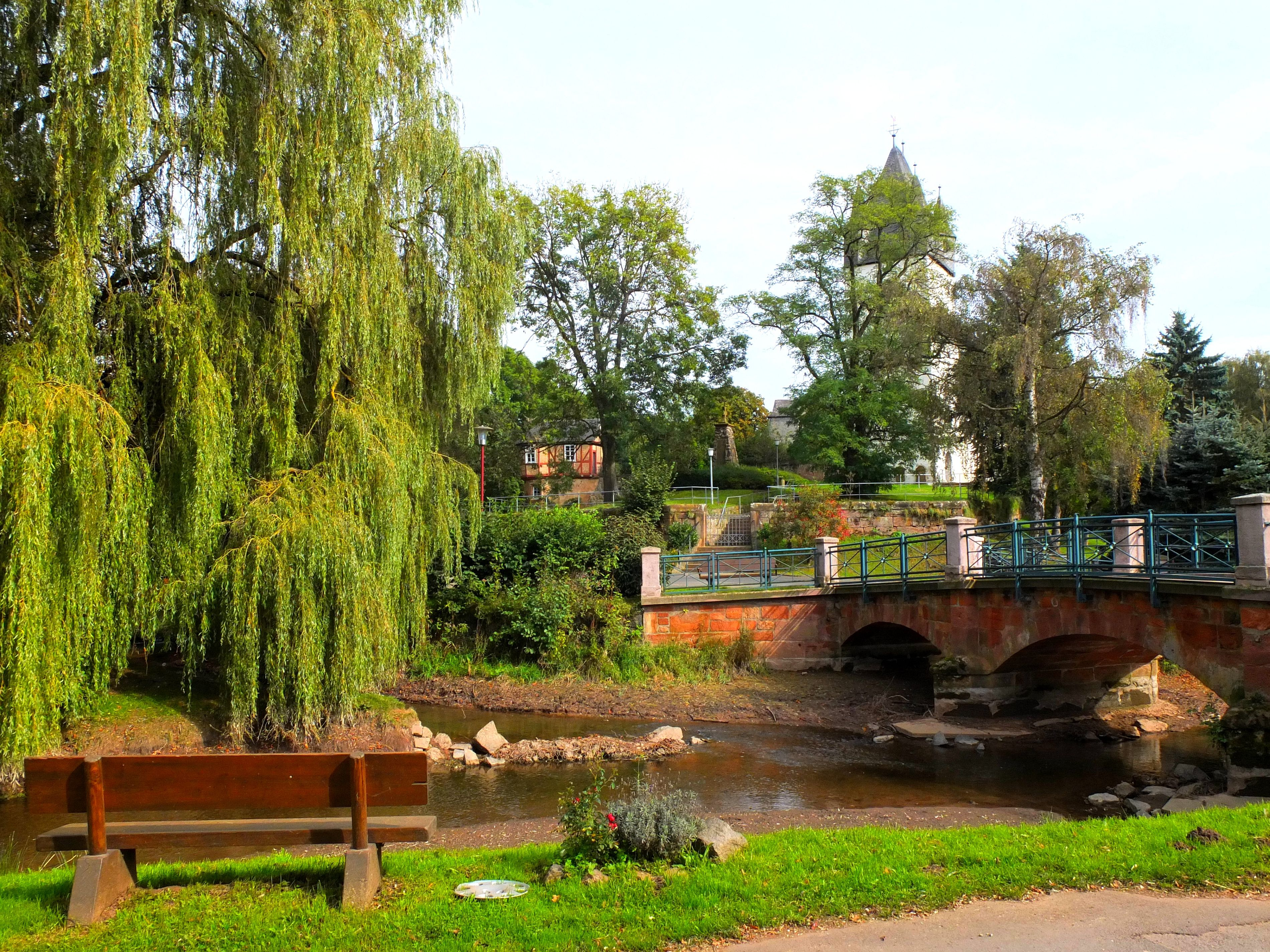 Mündung der Asphe in die Treisbach